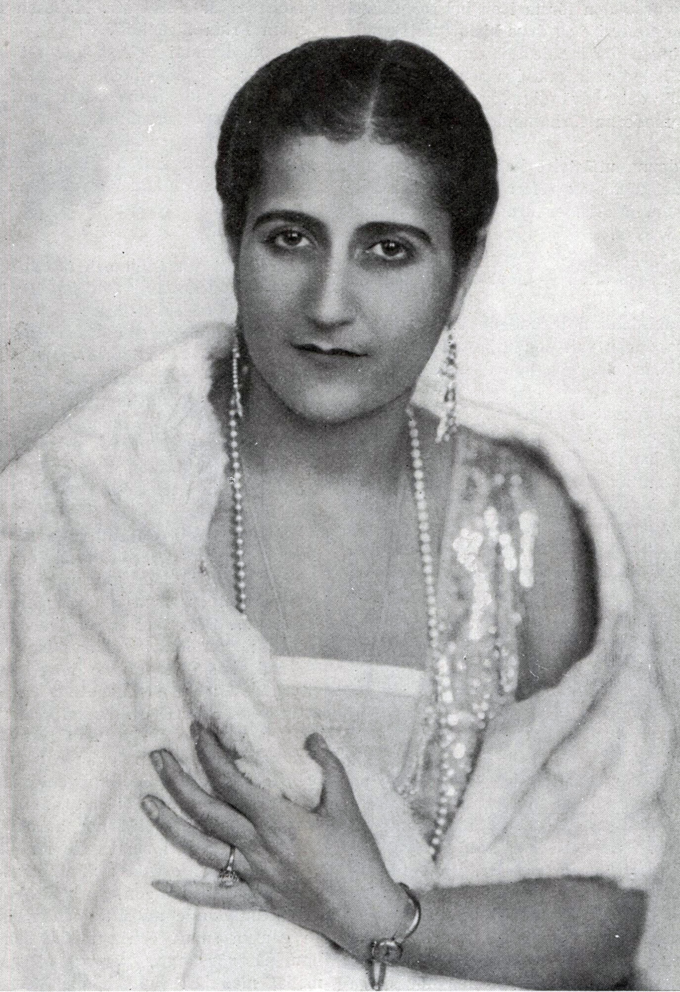 Isobel Ghasal (1896-1989). Porträtt i Scenen 1928.